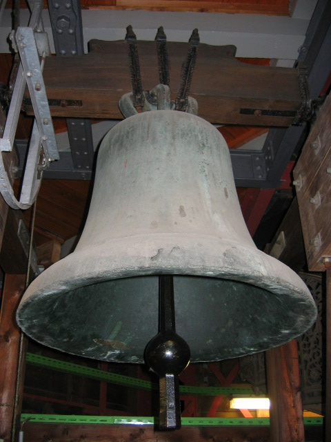 Wandlungsglocke, die tonhöchste Glocke des Dachreiters im Kölner Dom (e)